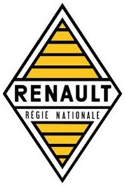 Ehemaliges Logo der Marke Renault (1946-1959).